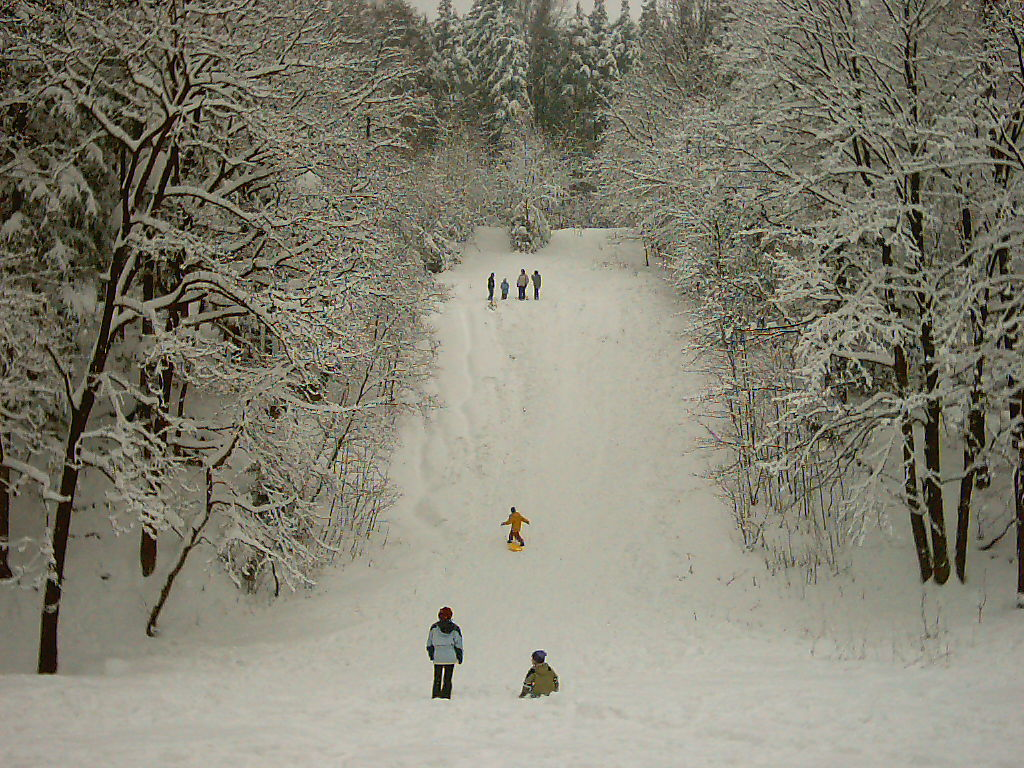 Zbocze_Koziej_Gory_na_ktorym_do_niedawna_znajdowala_sie_skocznia_narciarska.jpg